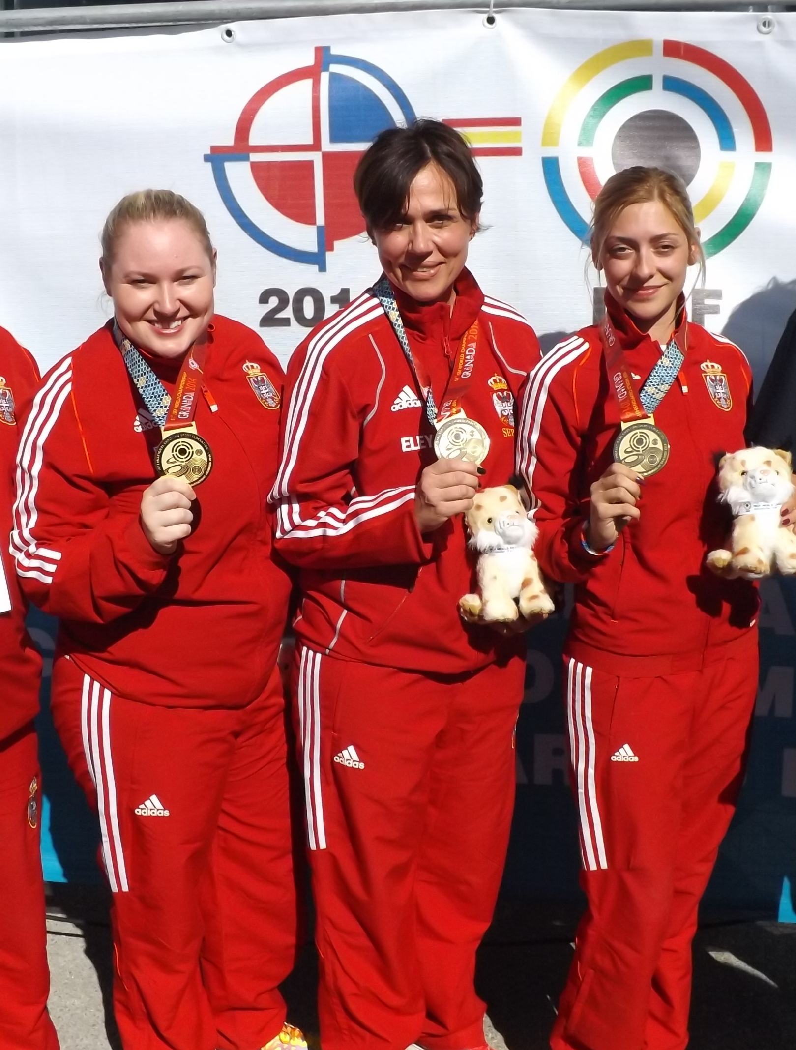 Zenska seniorska reprezentacija pistoljem, prvak sveta na SP u Granadi 2014, s leva: Zorana Arunović, Jasna Šekarić, Bobana Veličković